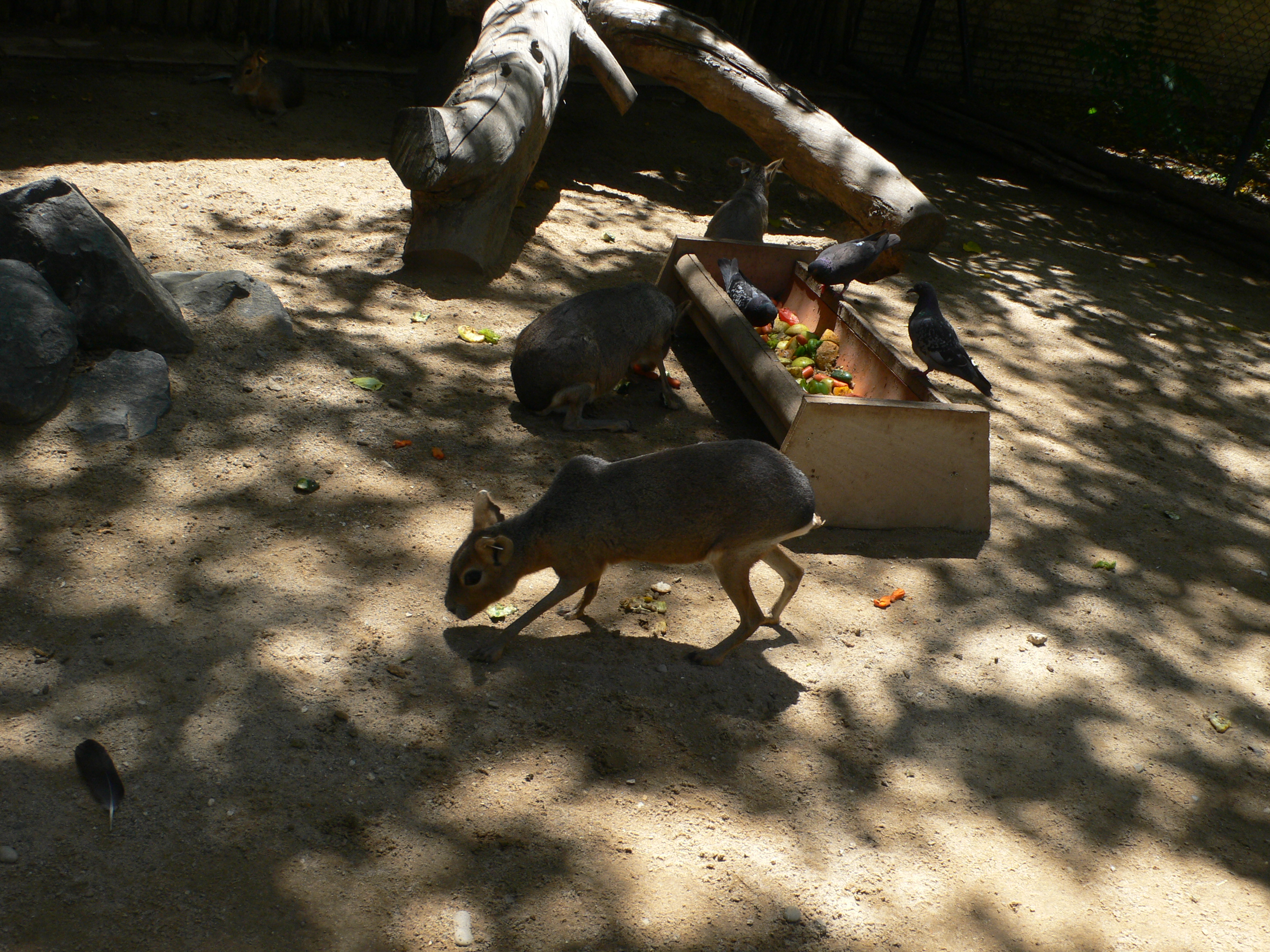 Dolichotis patagonum in Jerez de la Frontera Zoo. Andalusia (Spain)